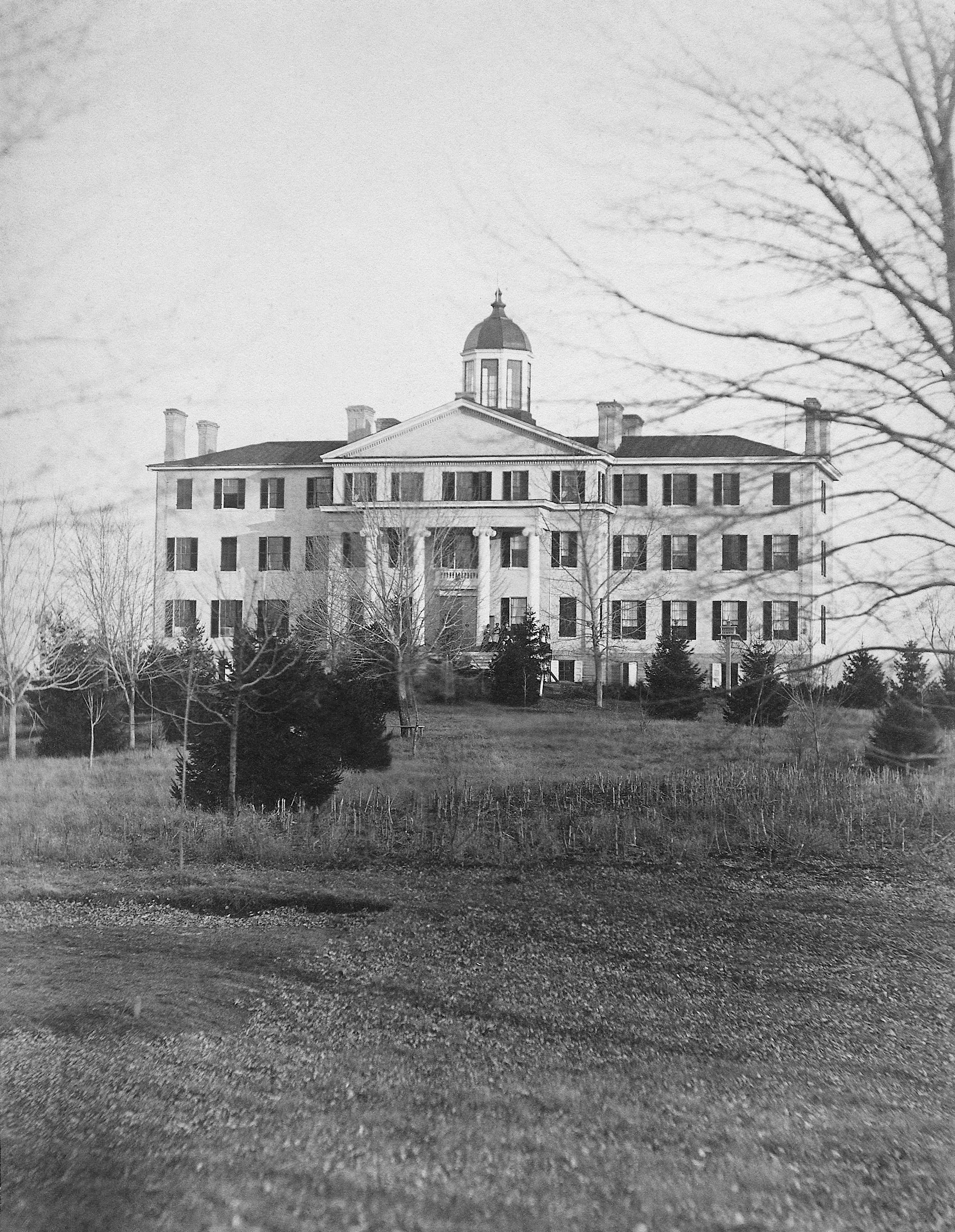 Kee Mar College, circa 1860s